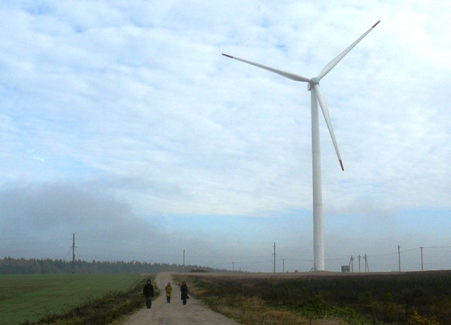 Фото путешествия по Беларуси.